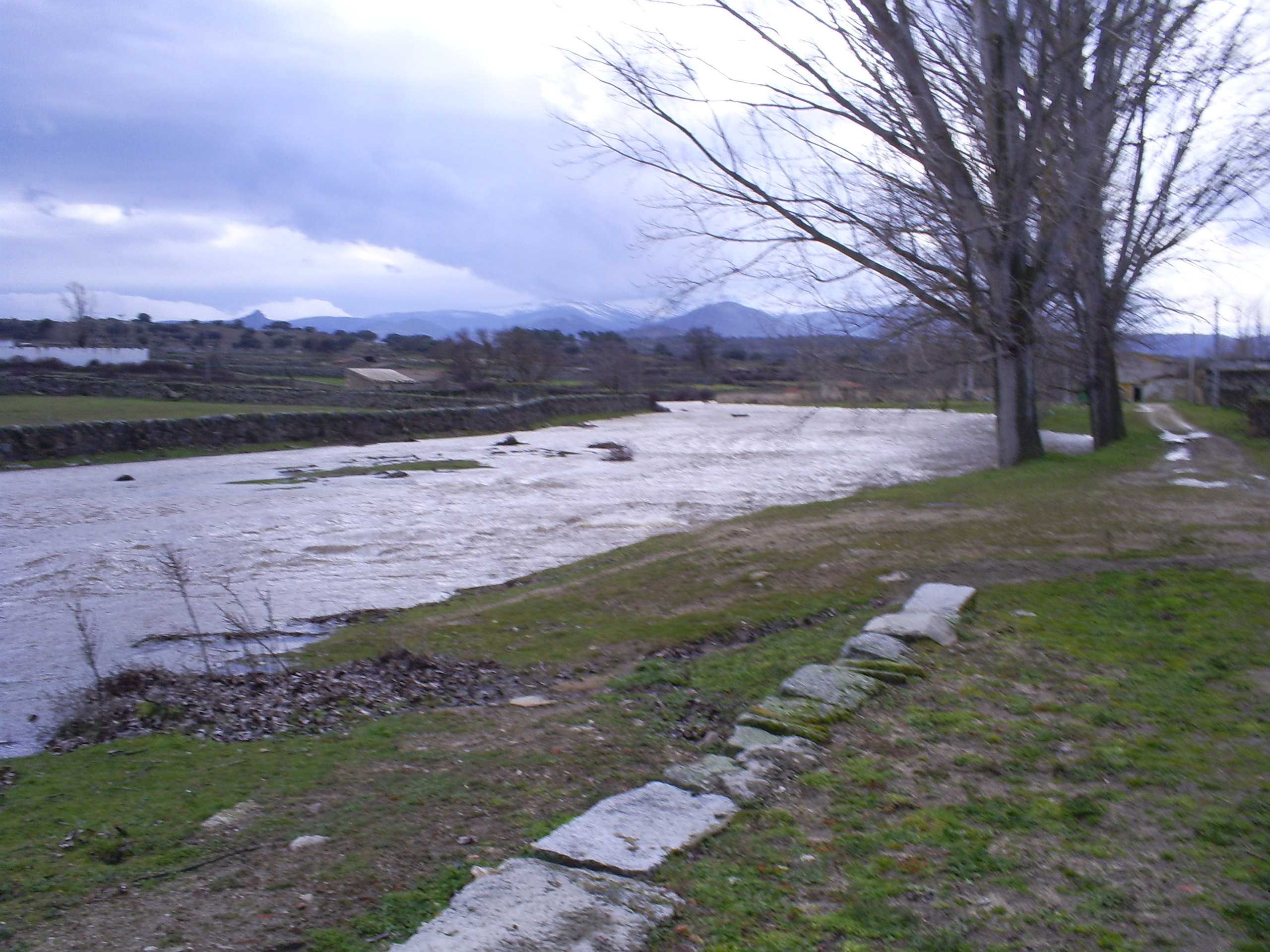 rio valvanera por Santibañez de Béjar